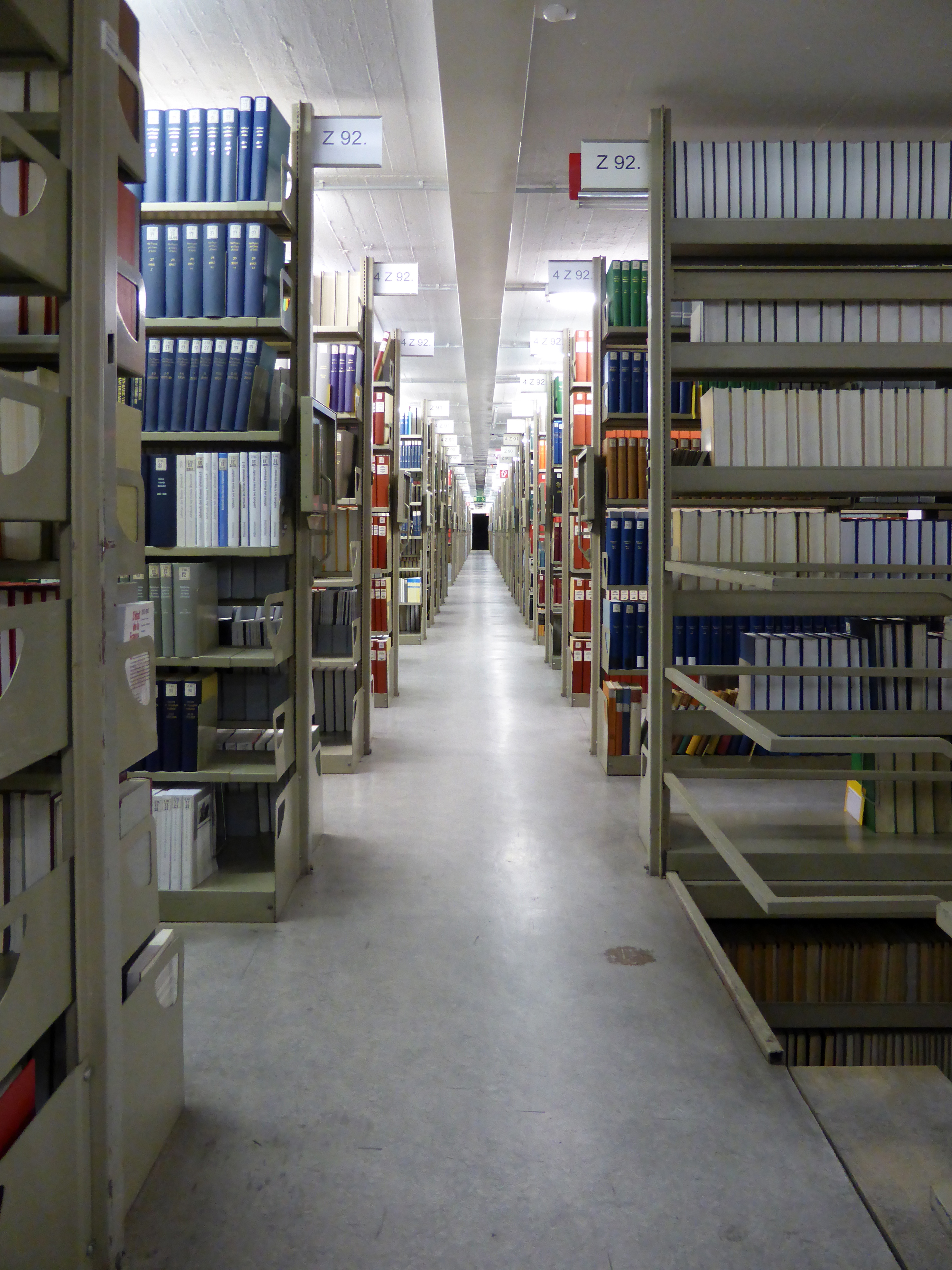 Buchmagazin der Bayerischen Staatsbibliothek.